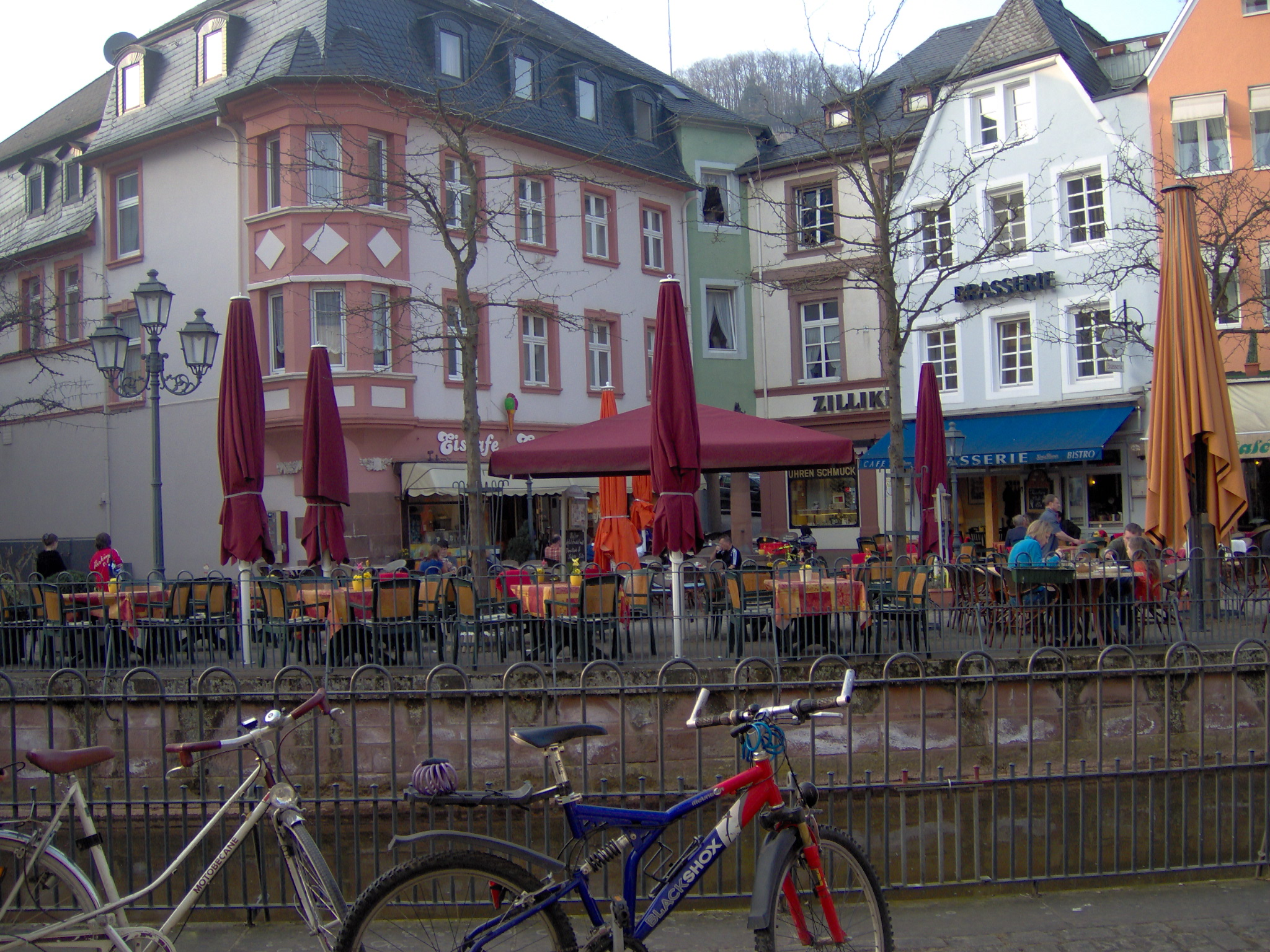 Buttermarkt Saarburg mit Leukbach und Hausnummer 4, ehemaliges Kaufhaus Heyman, heute Eisdiele Cascata